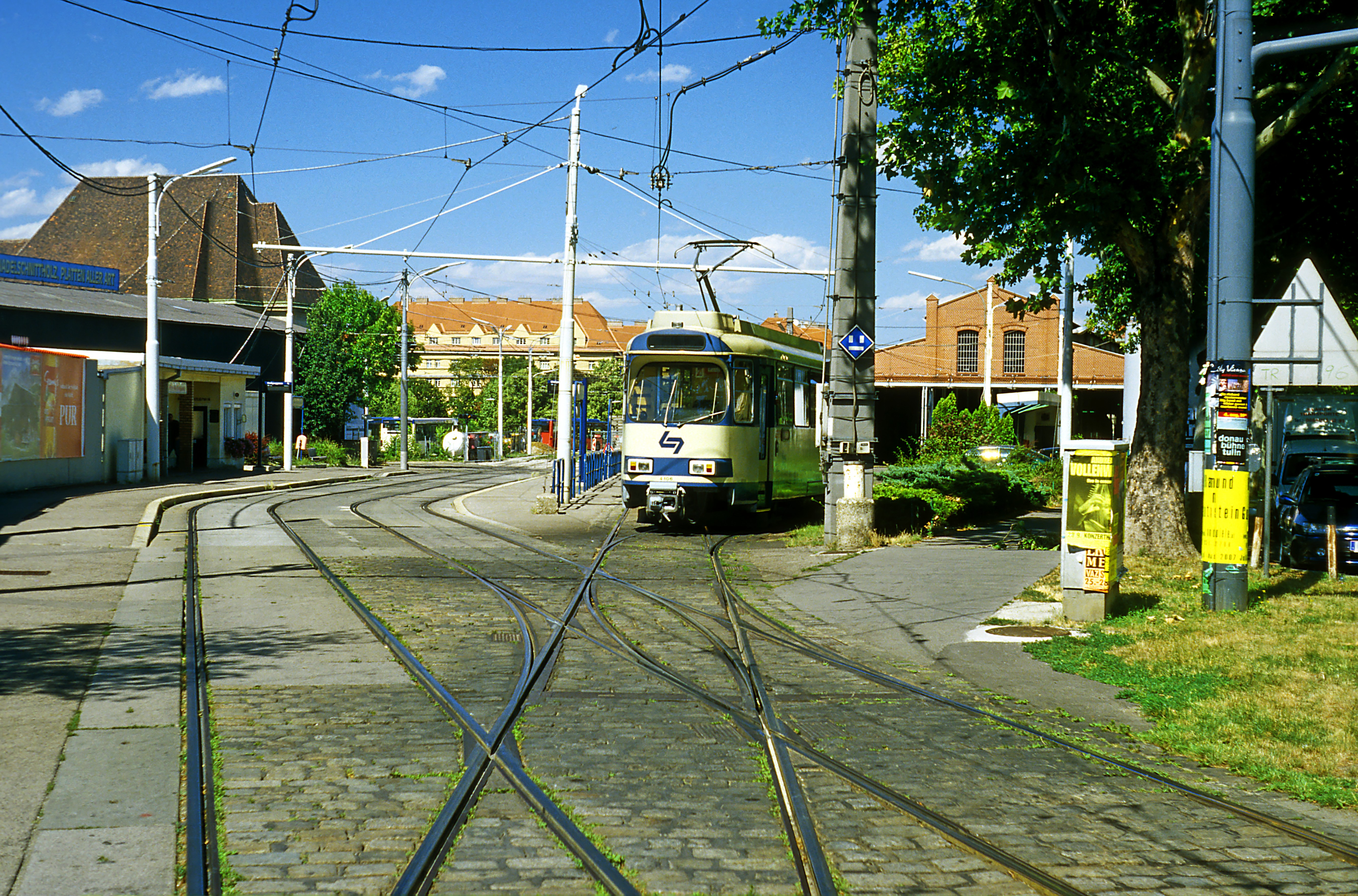 Aus Richtung Meidling, in der Bw-Einfahrt zum Triebwagenschuppen steht der Wagen 106. Davor liegt im Stammgleis Baden–Wien eine der seltenen eingepflasterten doppelten Kreuzungsweichen aus Rillenschienenmaterial.